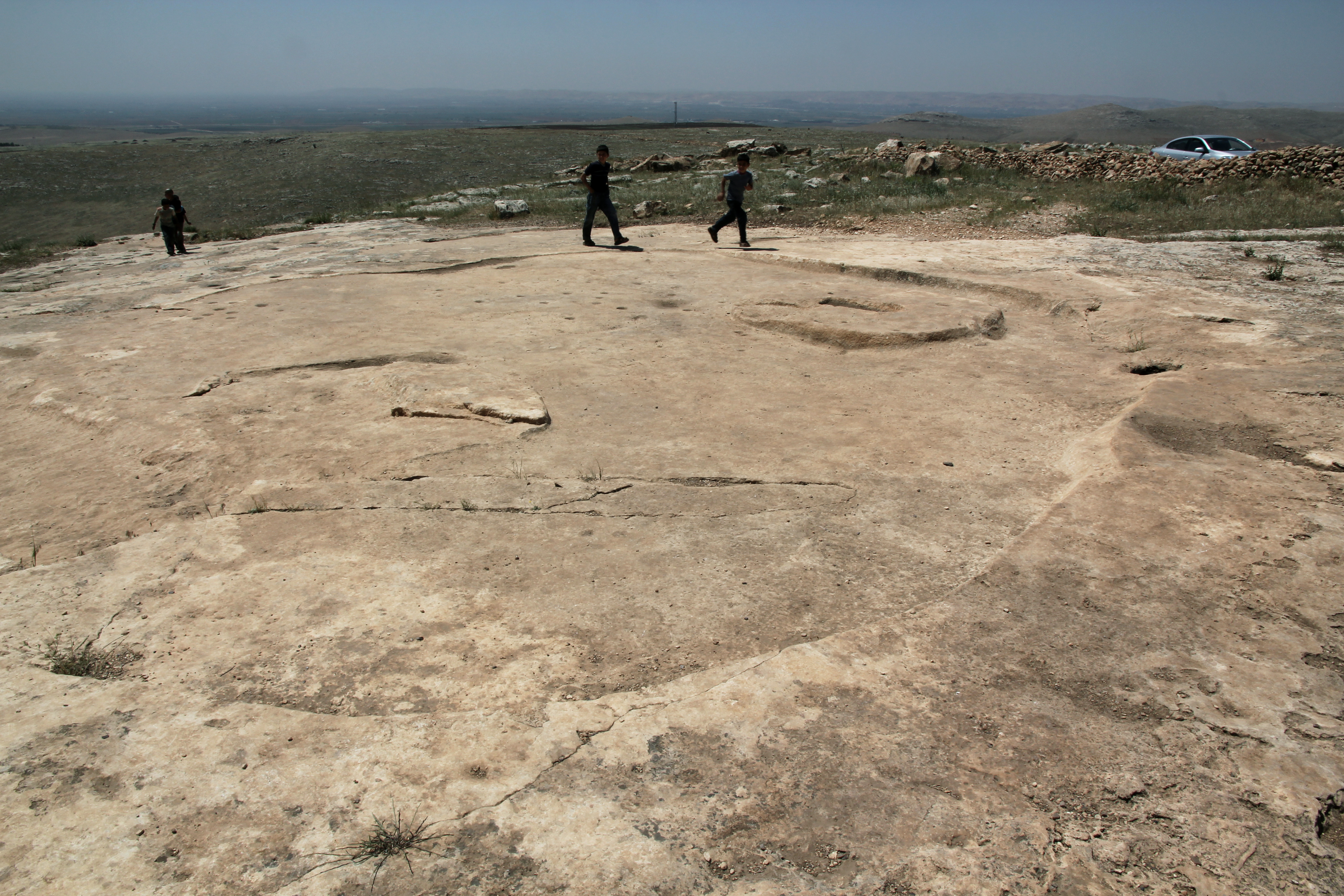 Göbekli Tepe, Siedlungshügel bei Şanlıurfa, Südosttürkei, Anlage E, genannt "Felsentempel"